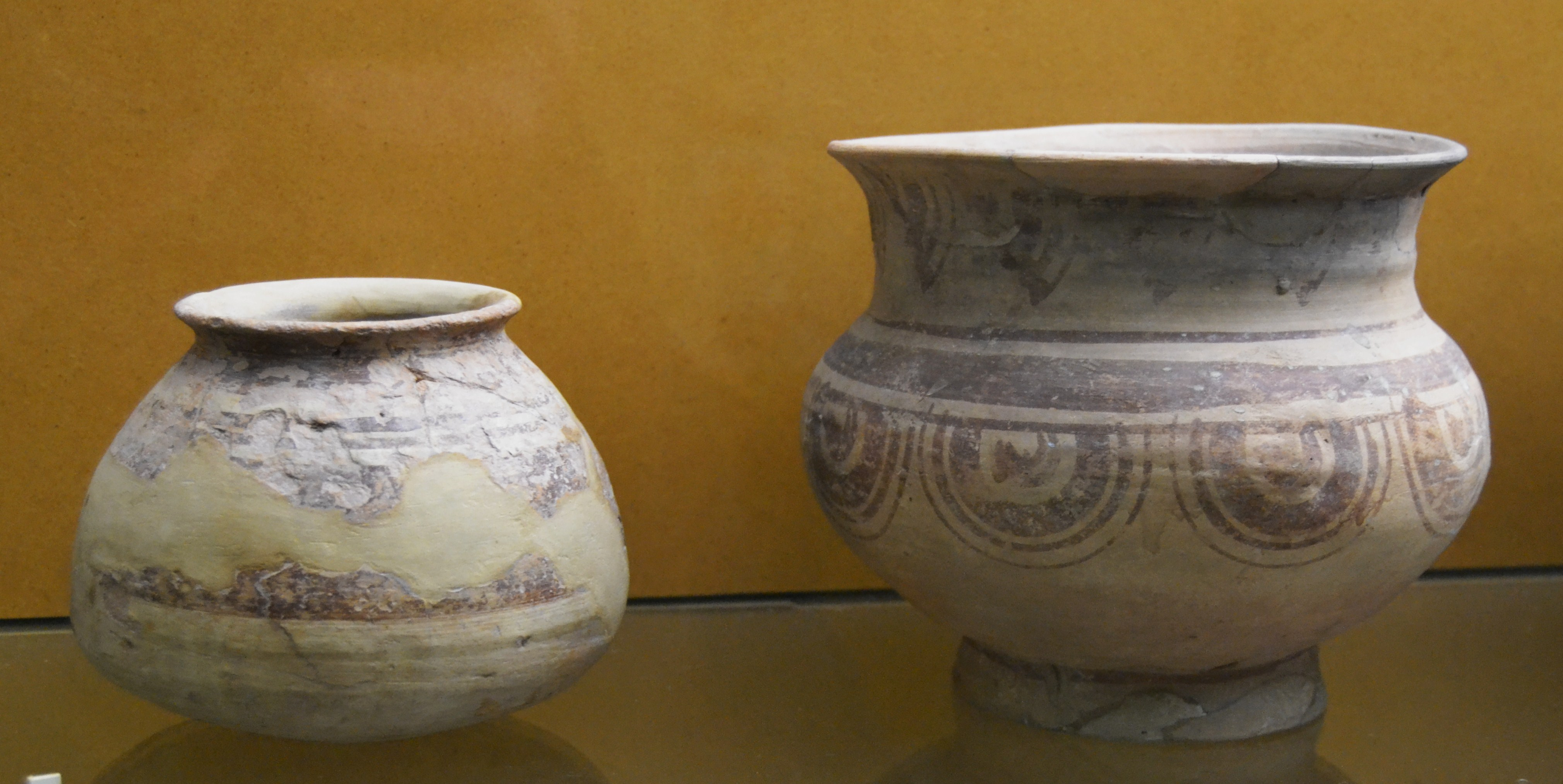 Ceràmica ibèrica, segles IV - II aC, la Seña (el Villar), museu de Prehistòria, València.